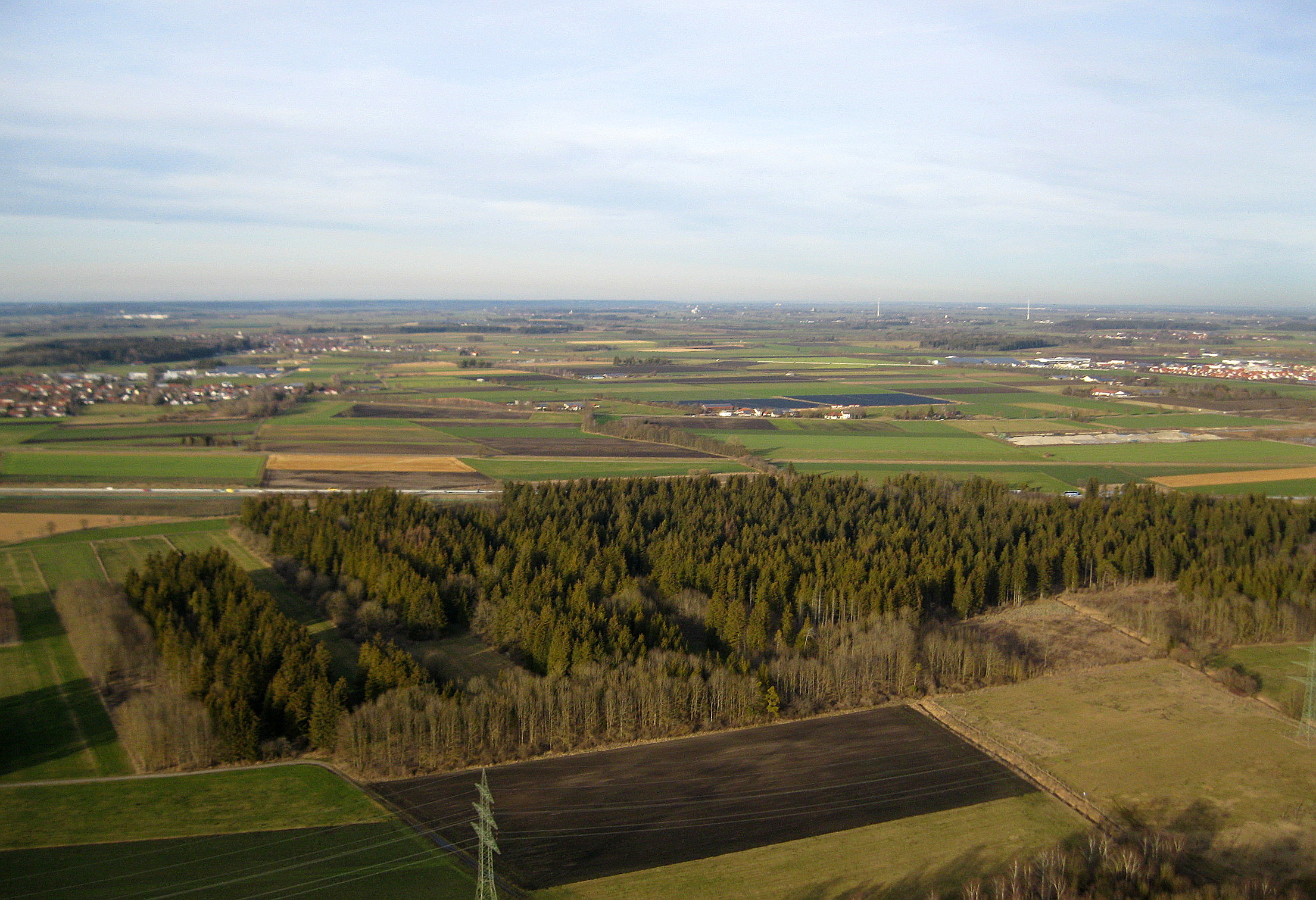 Das Wiedergeltinger Wäldchen von Süden. Unmittelbar im Hintergrund die quer durch das Bild verlaufende Autobahn 96 München-Lindau.